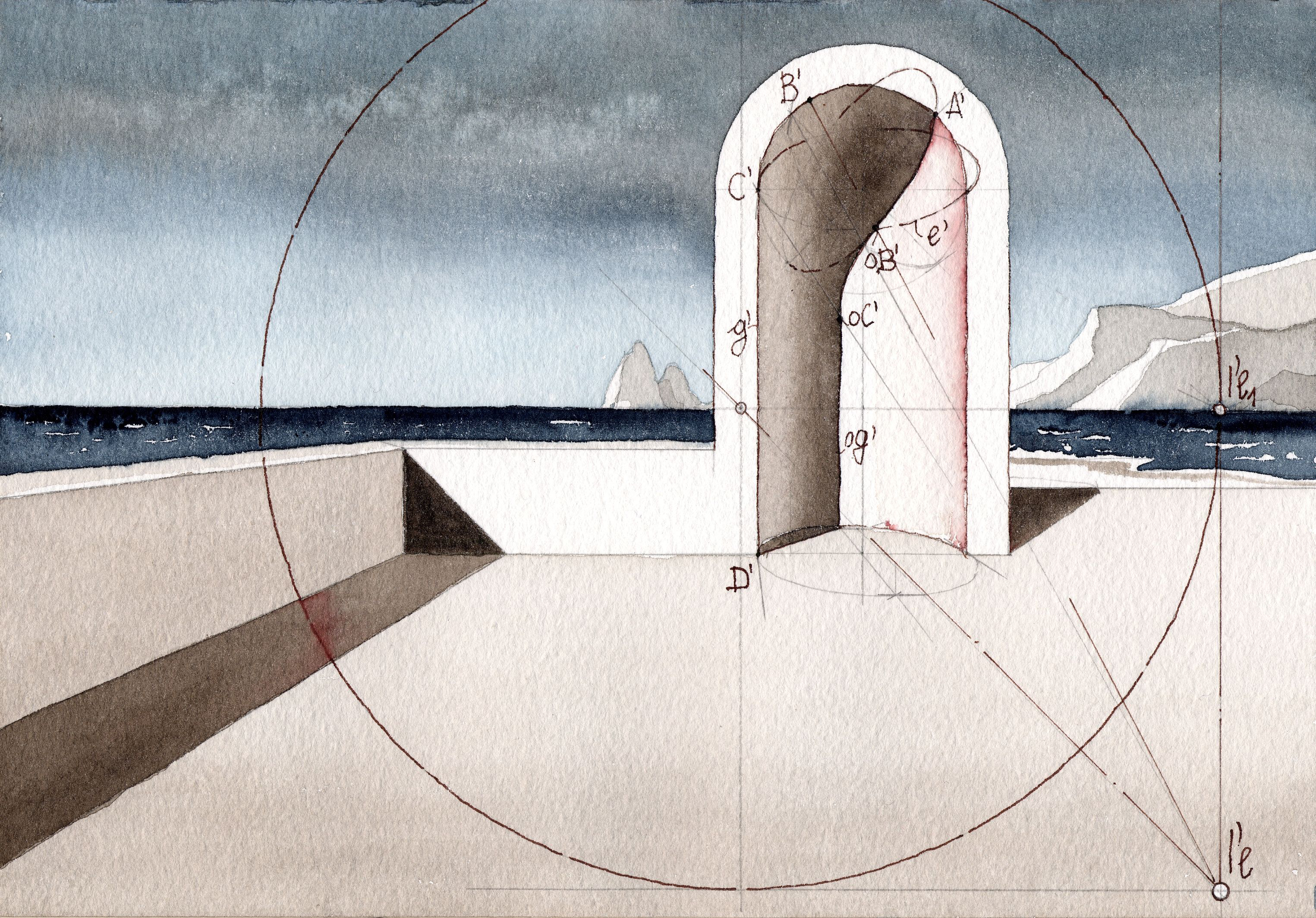 una delle figure del libro del prof. R. Migliari che mi ha concesso di pubblicare in wikipedia